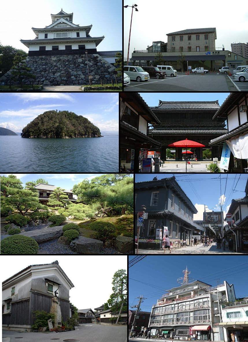 nagahamawikiを